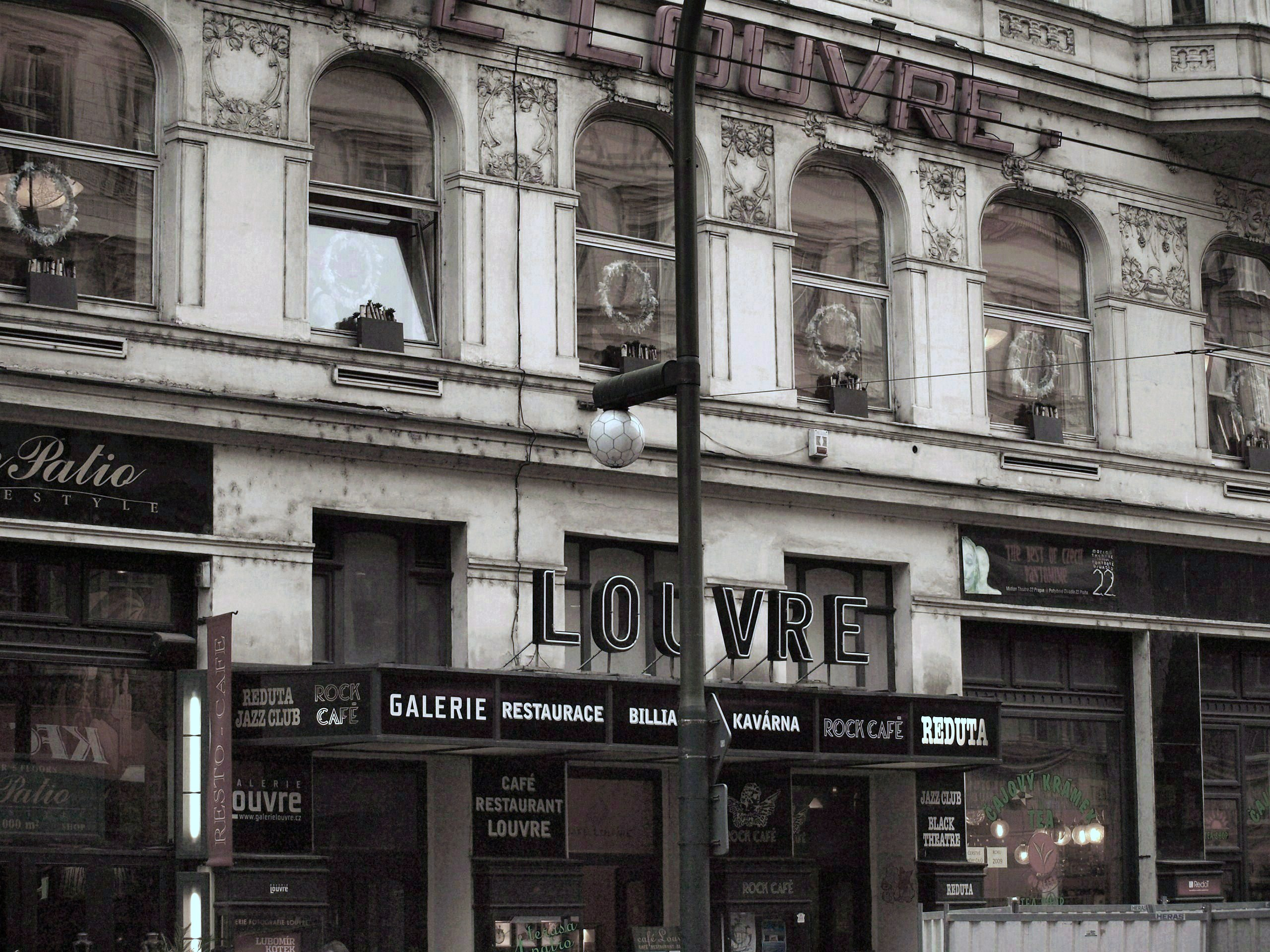 Pražská kavárna Café Louvre